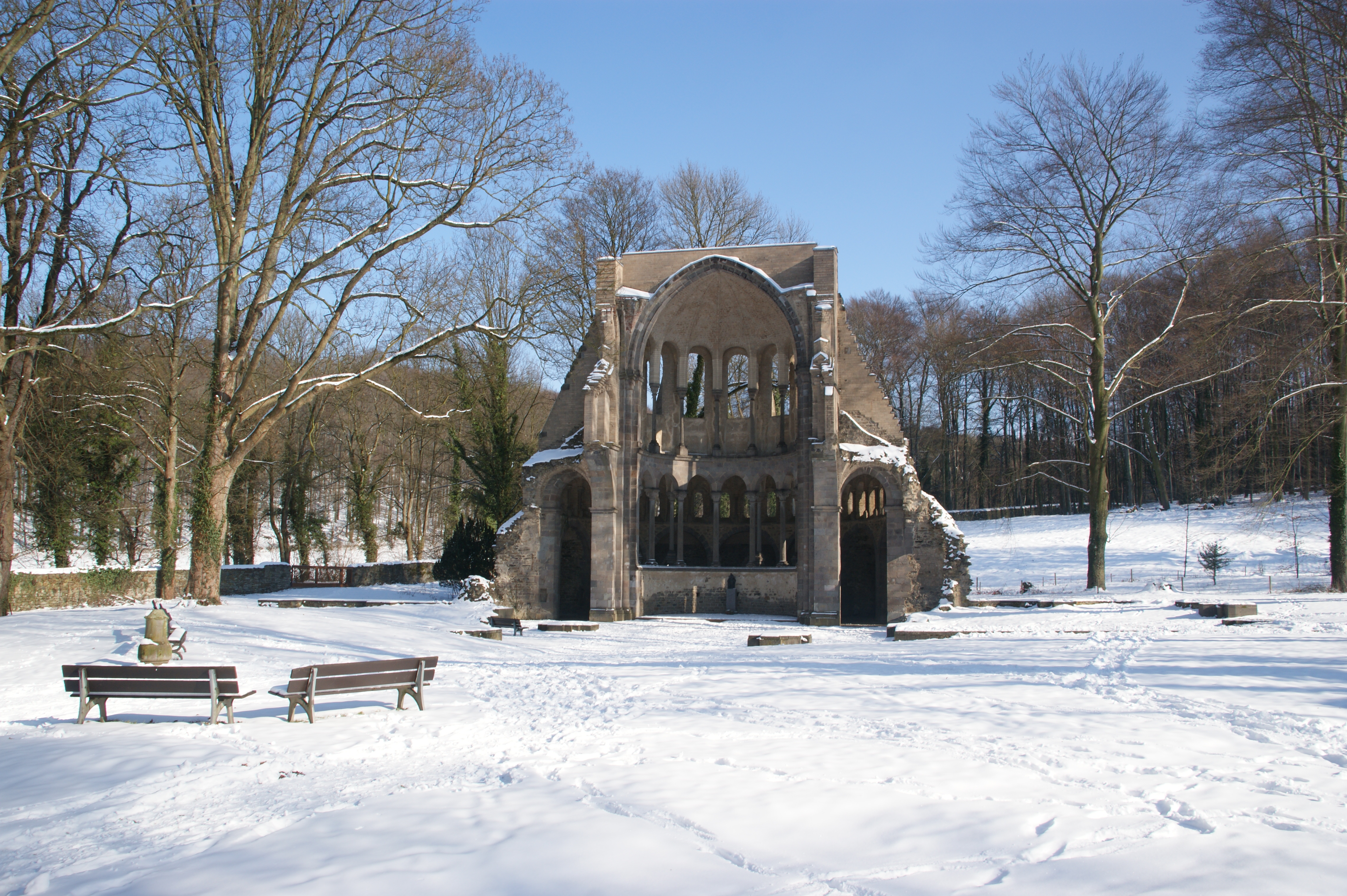 Chorruine Kloster Heisterbach in Königswinter